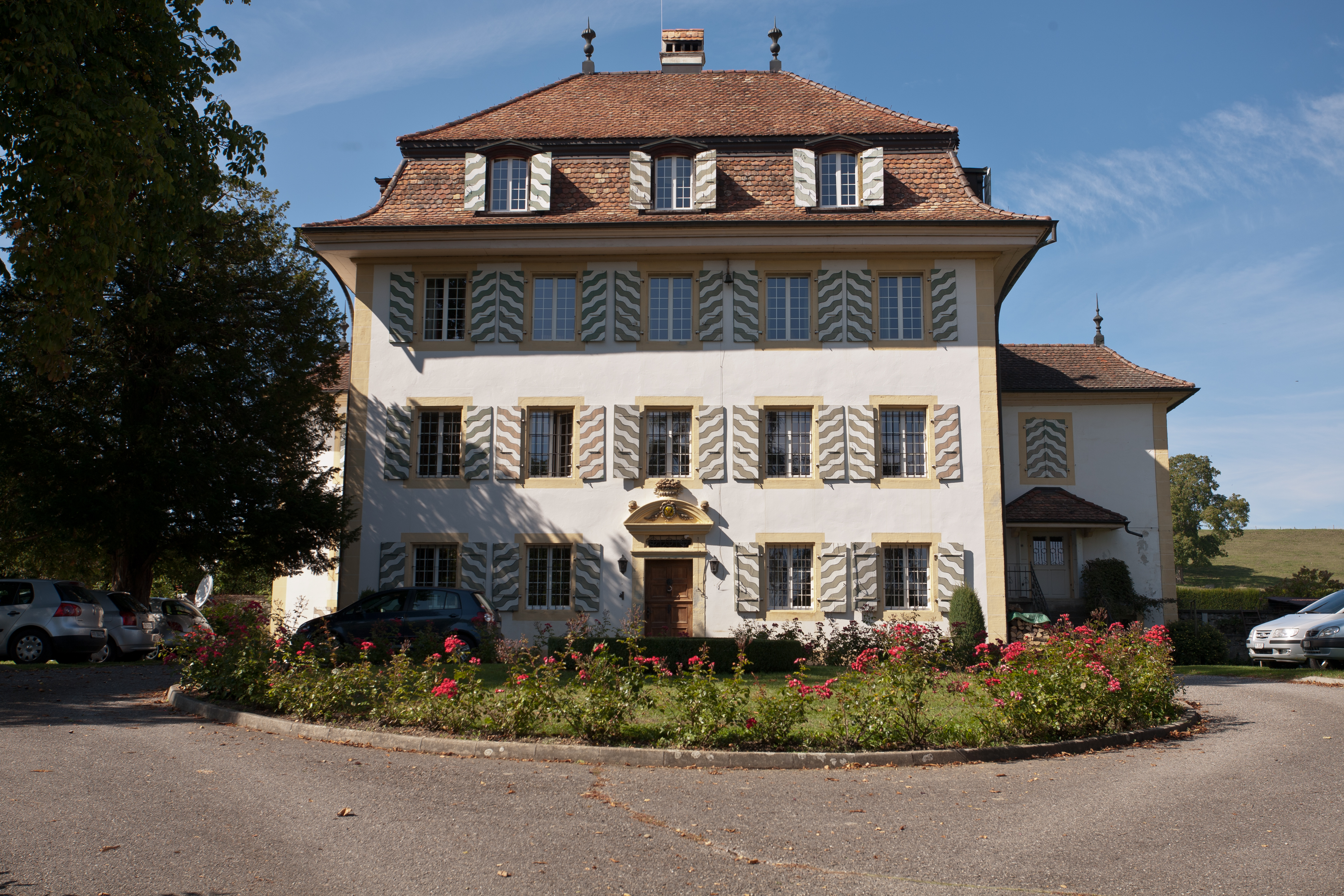 Torny Château de Diesbach